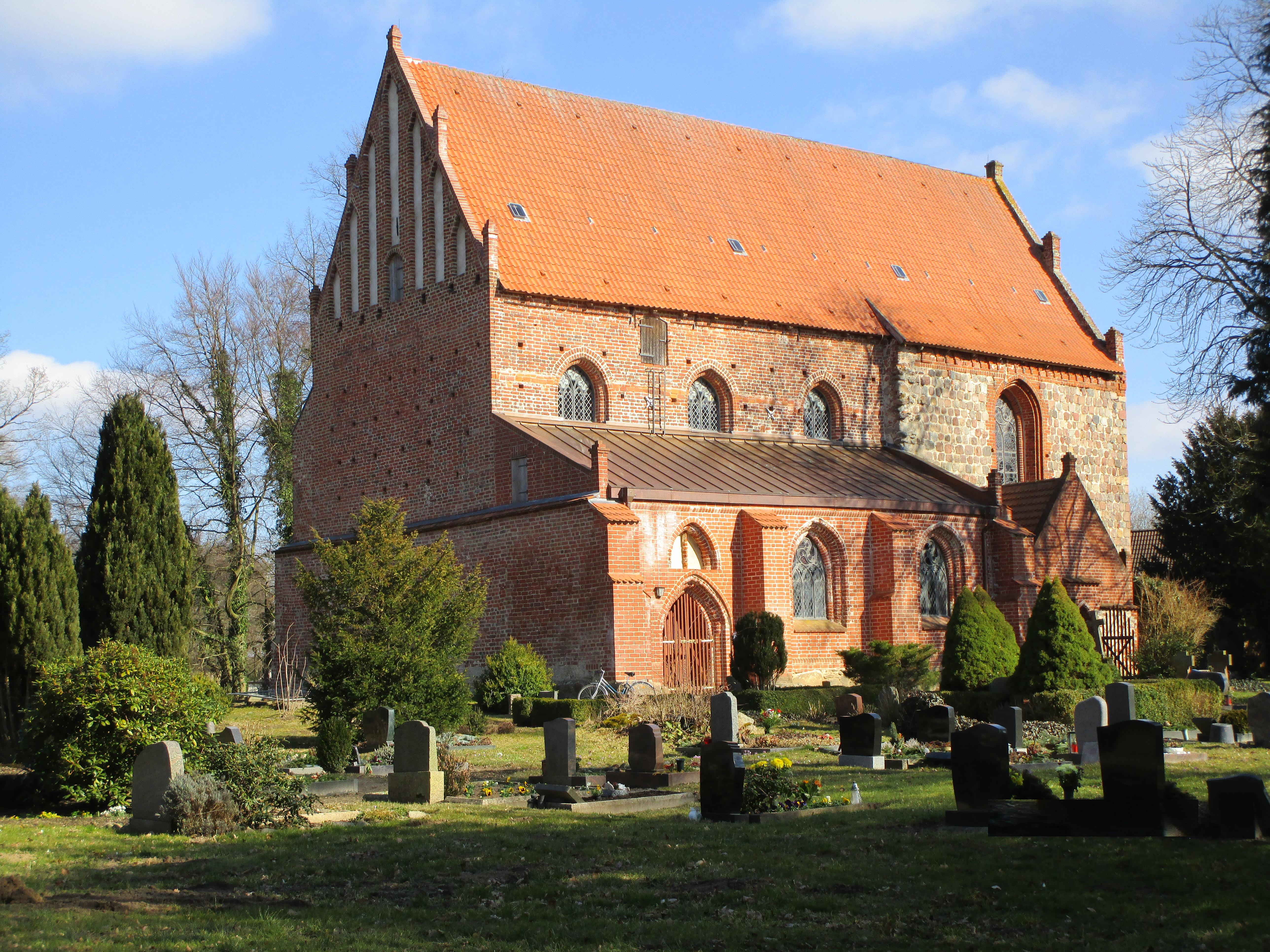 Kirche Behrenhoff aus Südwest nach den Außenrestaurationen